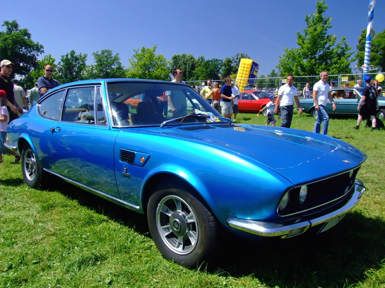 Quelle: selbst fotografiert, 06/2007 Fotograf: Späth Chr.